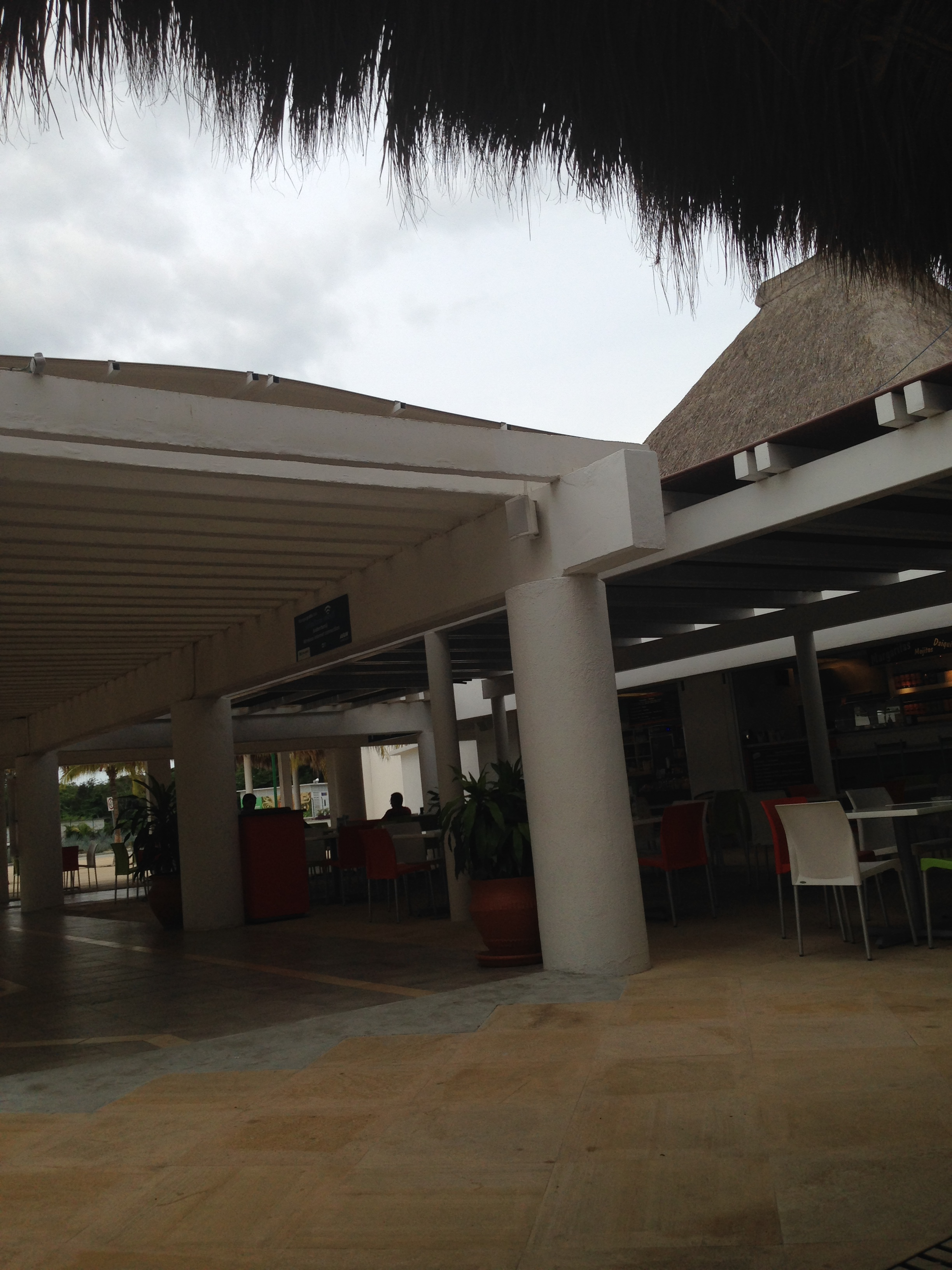 Interior del Aeropuerto de Huatulco.